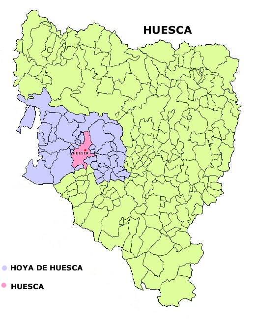 Mapa del municipio de Huesca Creado el 06.12.2005 por Dionisio en base a Image:Huesca municipalities.png